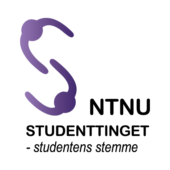 Studenttingets logo etter profilendringen i 2013.